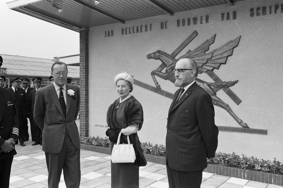 Kunstwerk voor luchtvaartpionier Jan Dellaert onthuld door prins Bernhard. V.l.n.r. prins Bernhard, mevrouw Dellaert en beeldhouwer Dick Stins.